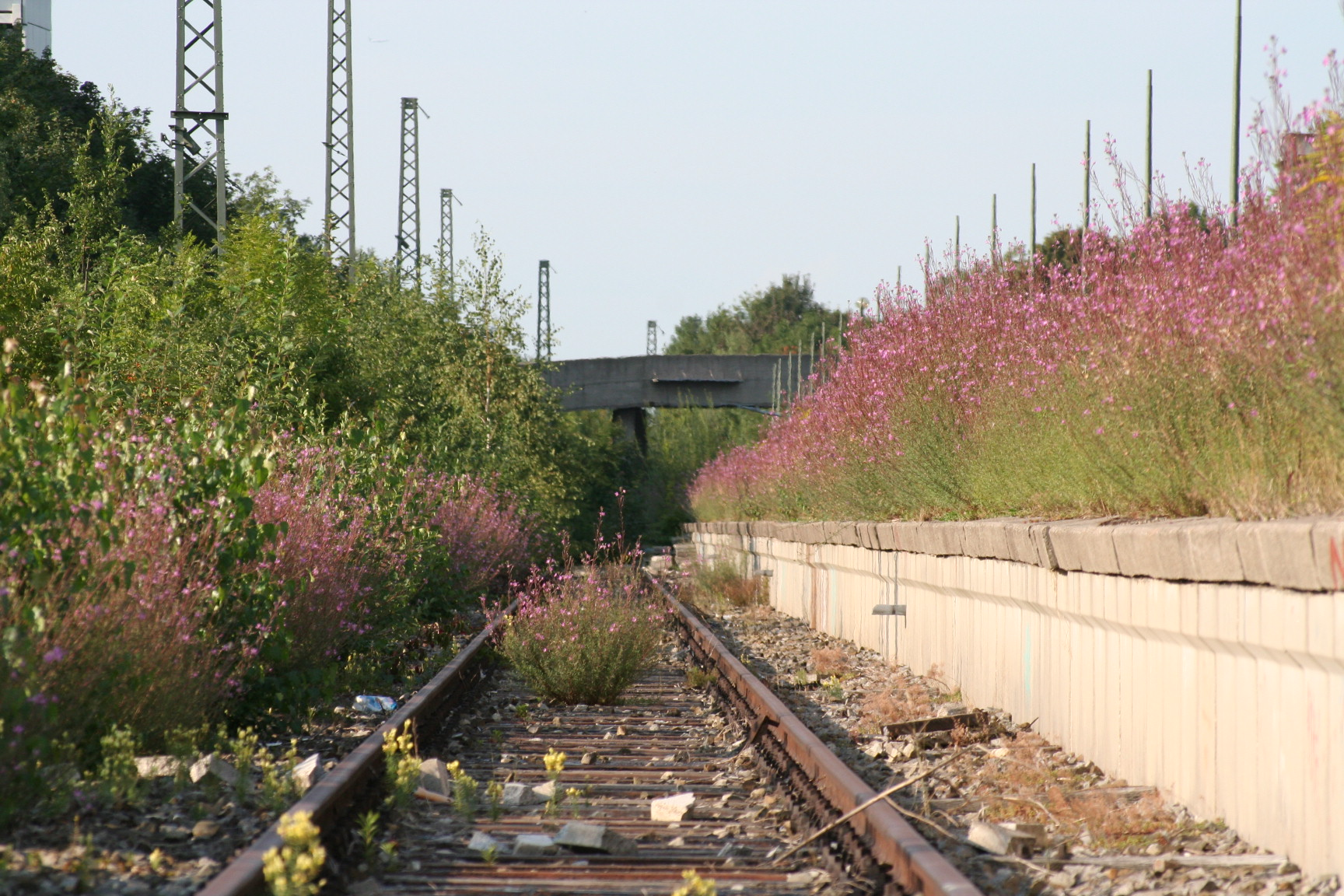 Pflanzenbewuchs der aufgelassenen S-Bahn Haltestelle Olympiastadion in München